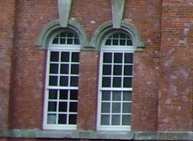 建中紅樓 紅磚特色